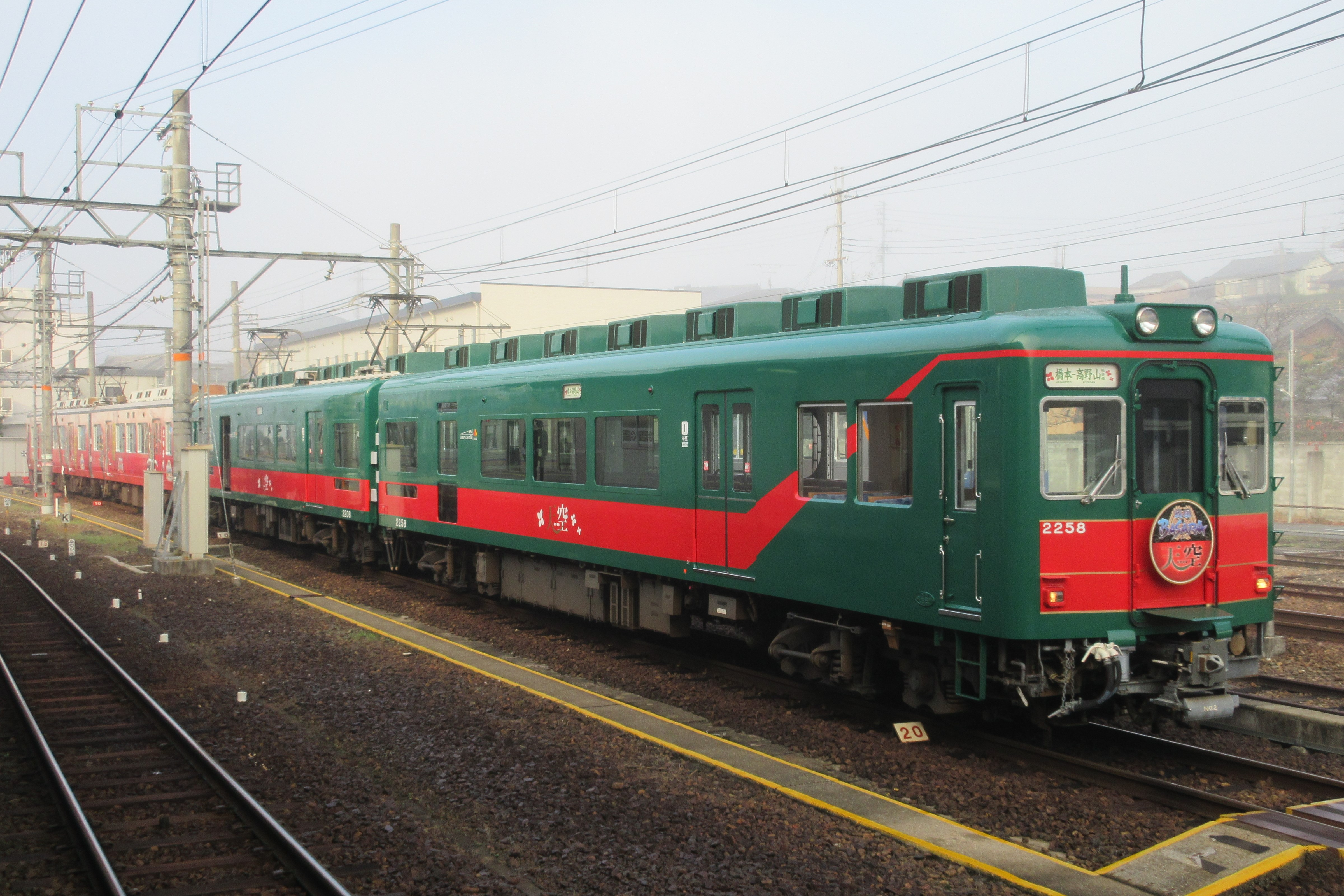 南海電鉄2258 (橋本駅にて)